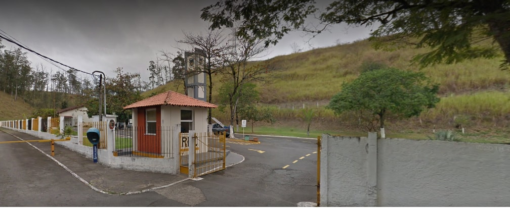 futebol